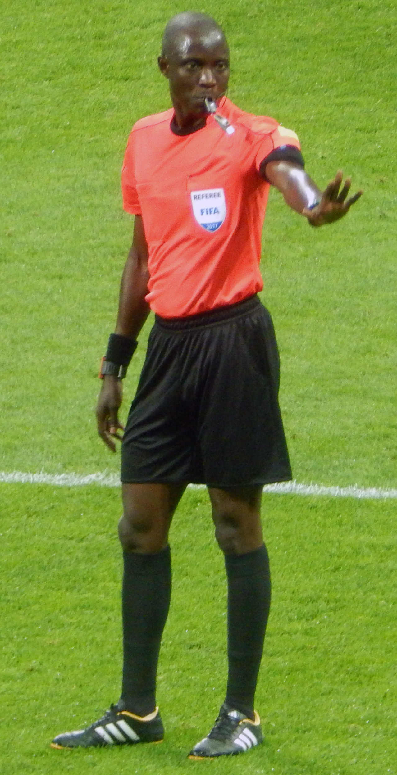 Судья Бакари Гассама